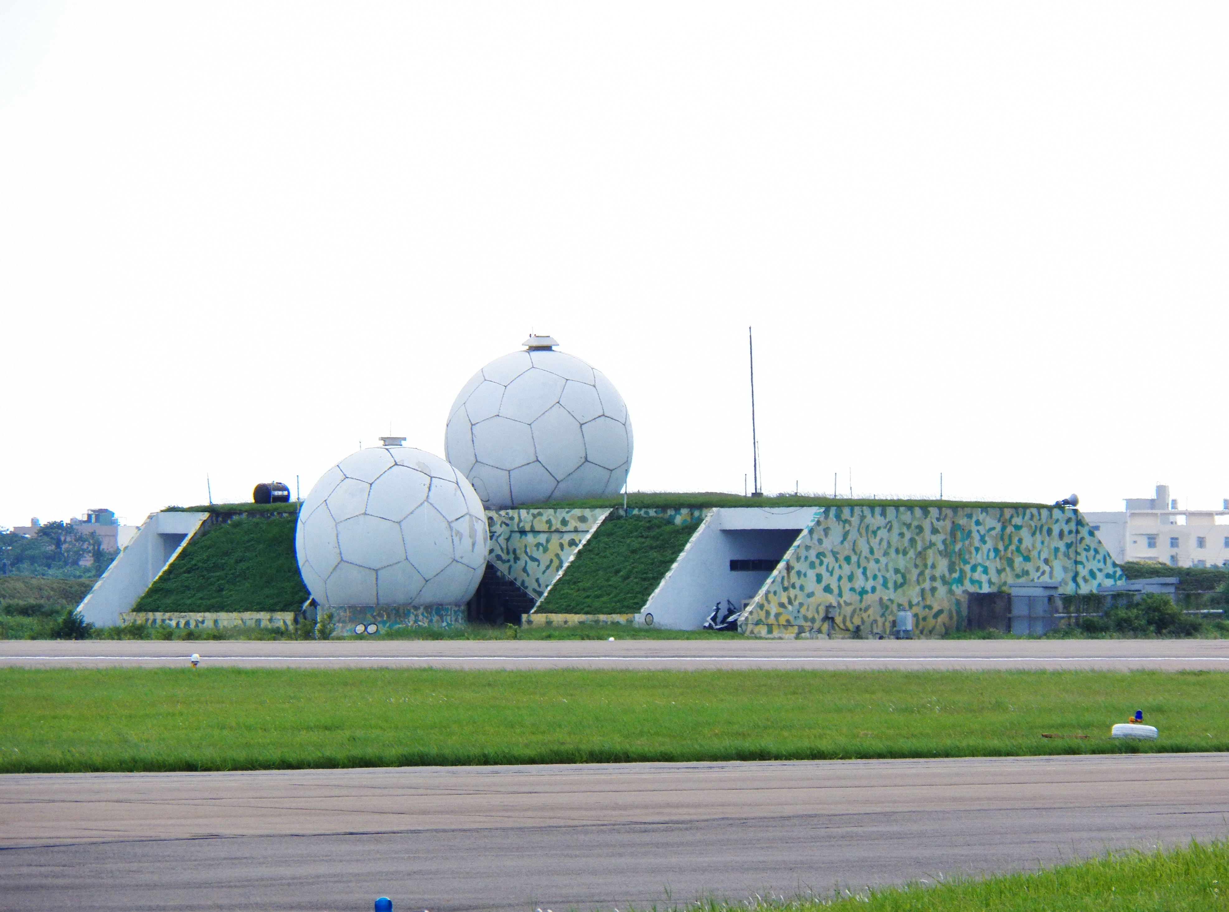 空軍新竹基地氣象雷達，俗稱哈密瓜球。